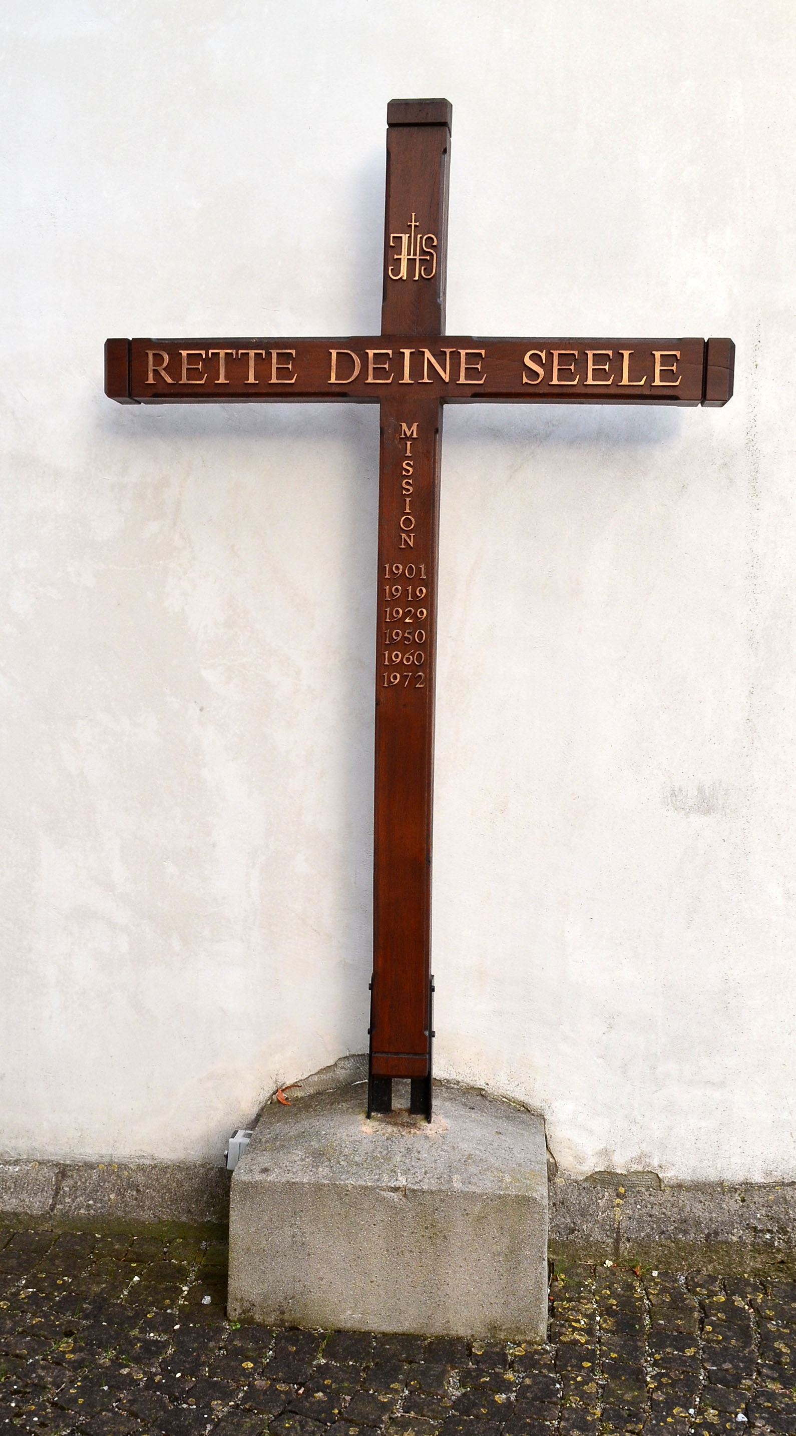 Madfeld, St. Margaretha Missionskreuz